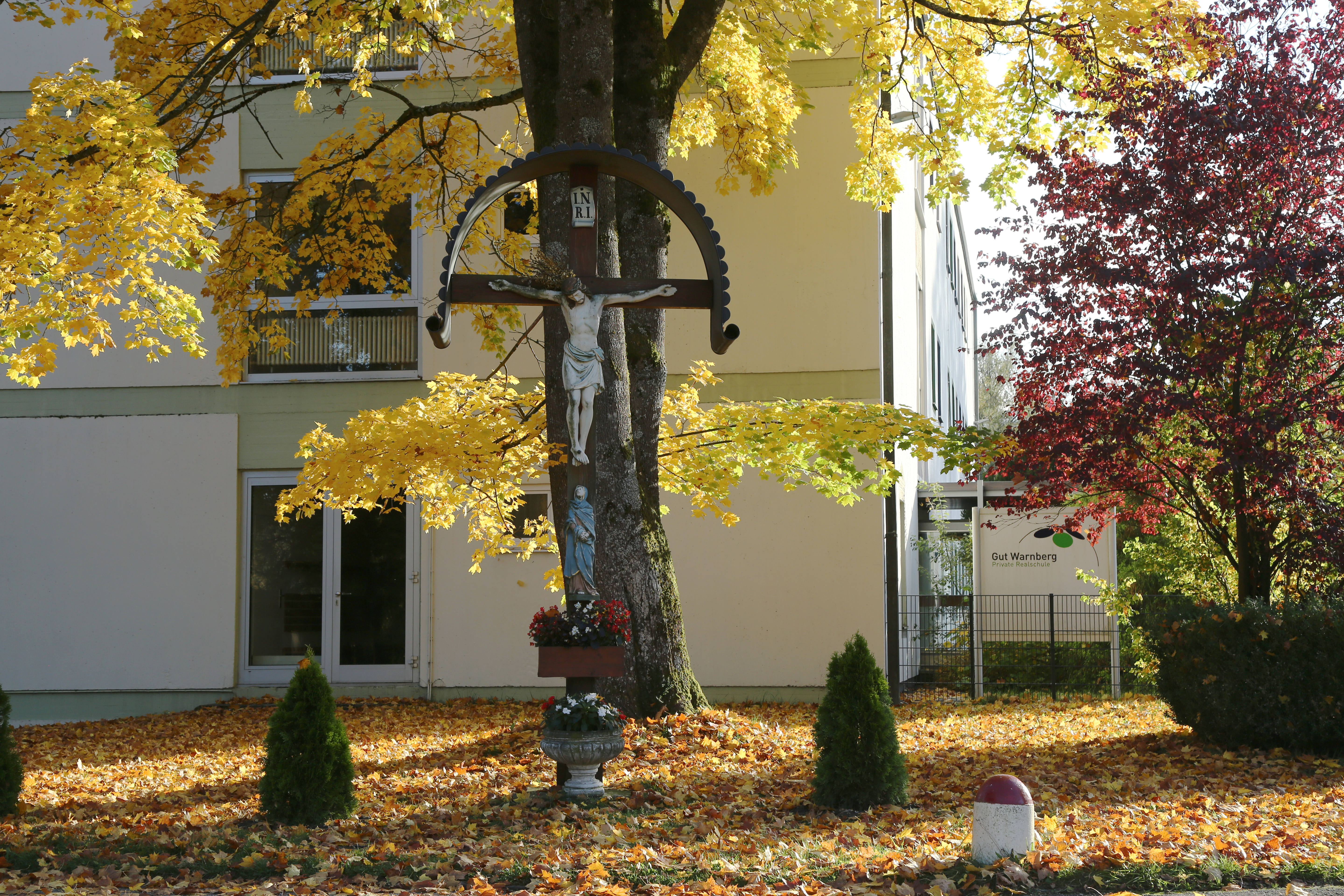 Gut Warnberg in München-Solln. Auf den Gelände eines historischen Gutes befinden sich die Marienanstalt Warnberg, die Privatschule Gut Warnberg, ein Reitstall und weitere Gebäude. Das Bild zeigt das historische Standkruzifix vor dem Neubau der Realschule von 1964